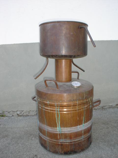 Alambicco